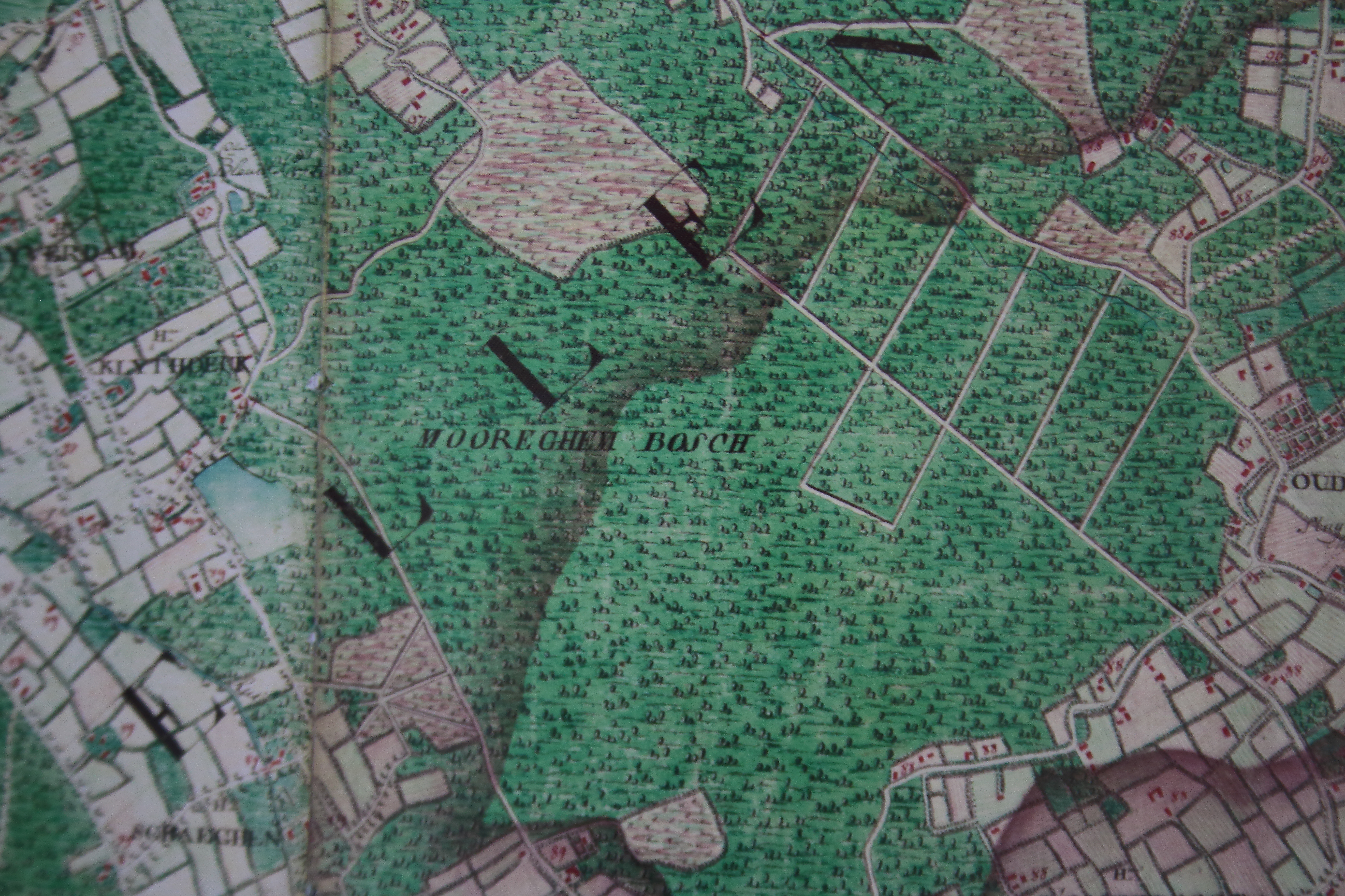 Oud-Moregembossen, Ferrariskaart (1771)